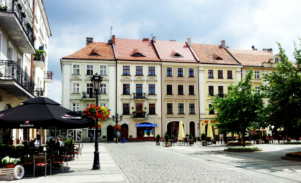 Główny Rynek w Kaliszu